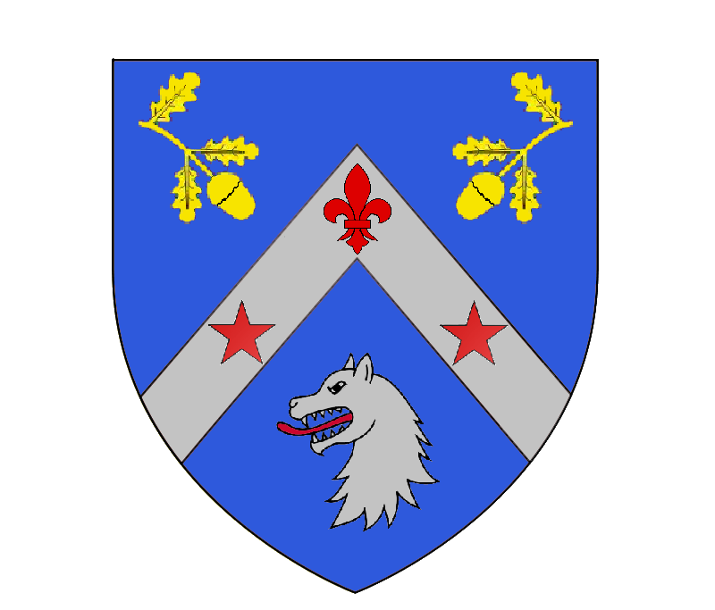 D'azur au chevron d'argent chargé d'une fleur de lis au pied nourri de gueules en chef et de deux étoiles du même en flancs, accompagné en chef de deux glands feuillés de deux pièces d'or et en pointe d'une tête de loup arrachée d'argent et lampassée de gueules.